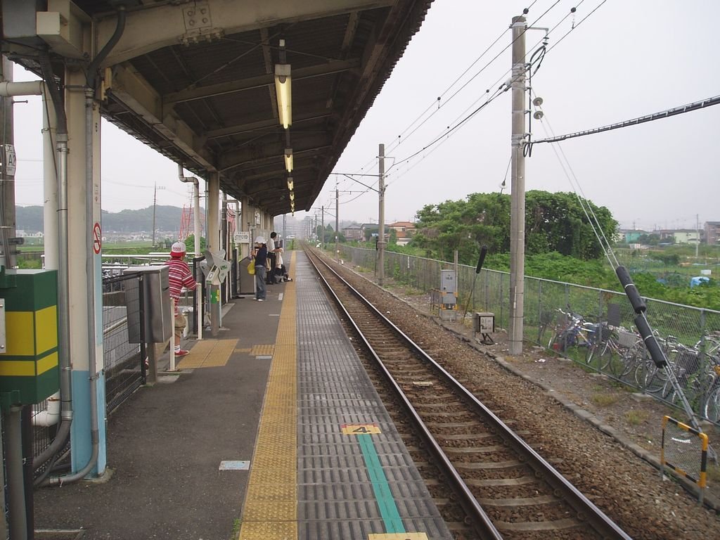 Iriya Station platform on JR Sagami Line, Zama, Kanagawa 入谷駅 (神奈川県)